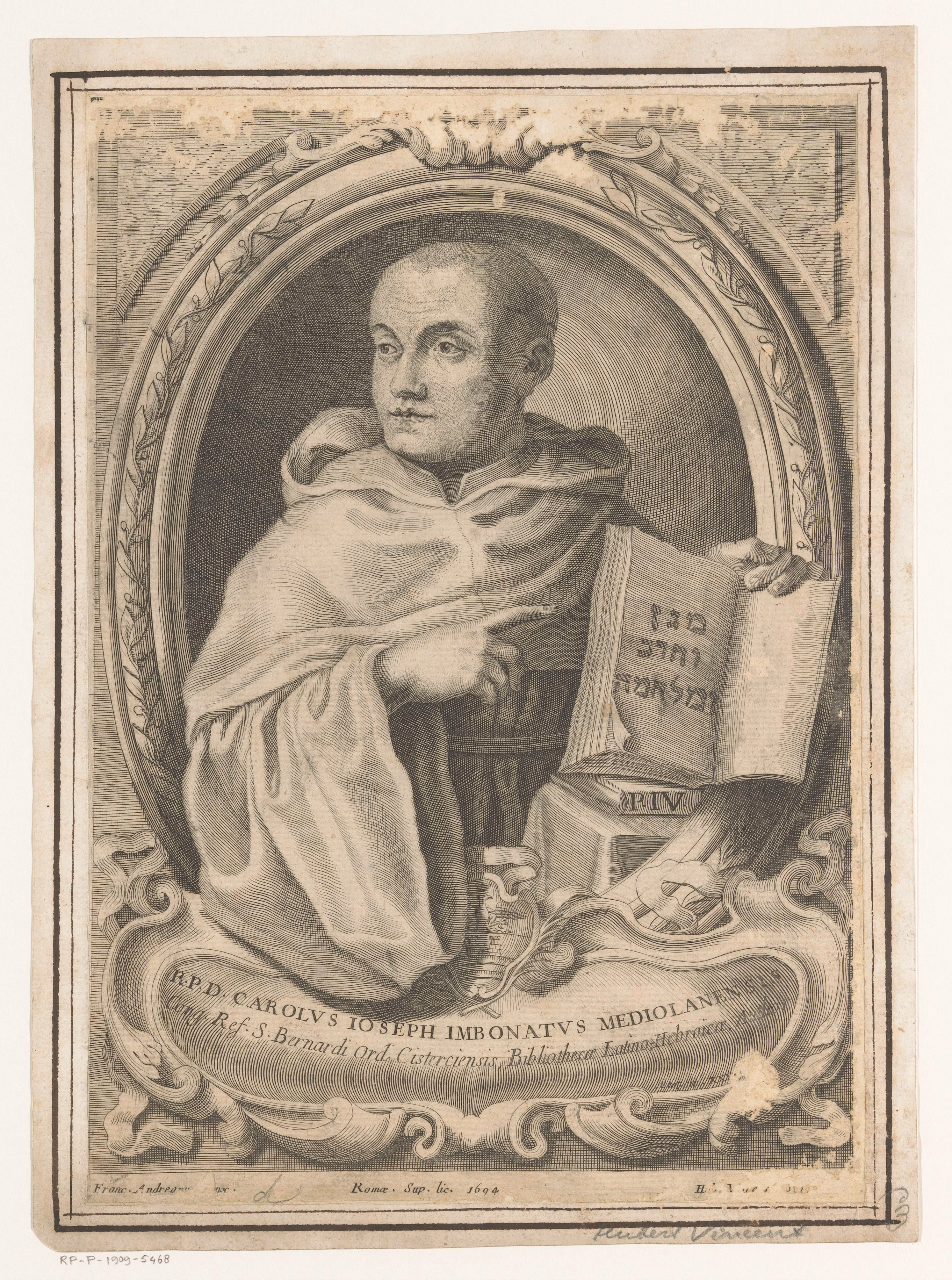 IdentificatieTitel(s): Portret van Carlo Giuseppe ImbonatiTitelpagina voor: Carlo Giuseppe Imbonati, Bibliotheca Latino-Hebraica (...), 1694Objecttype: prent titelpagina Objectnummer: RP-P-1909-5468Opschriften / Merken: verzamelaarsmerk, verso, gestempeld: Lugt 2228VervaardigingVervaardiger: prentmaker: Hubert Vincent (vermeld op object)naar schilderij van: Francesco Andreoni (vermeld op object)verlener van privilege: Innocentius XII (vermeld op object)Plaats vervaardiging: prentmaker: Romenaar schilderij van: Italiëverlener van privilege: RomeDatering: 1694Fysieke kenmerken: ets en gravure; in omlijsting met pen in bruinMateriaal: papier inkt Techniek: graveren (drukprocedé) / etsen / penAfmetingen: blad: h 305 mm (binnen plaatrand afgesneden) × b 222 mm (binnen plaatrand afgesneden)ToelichtingTitelpagina voor: Imbonati, Carlo Giuseppe. Bibliotheca Latino-Hebraica, sive de Scriptoribus latinis, qui ex diversis nationibus contra Judaeos vel de re hebraica utcumque scripsere (...). Rome: Sacra Congregatio de Propaganda Fide, 1694.OnderwerpWat: historical personsHebrew scriptmonastic orders, monastic life: CistercianstheologianWie: Carlo Giuseppe ImbonatiVerwerving en rechtenVerwerving: aankoop 1905Copyright: Publiek domein